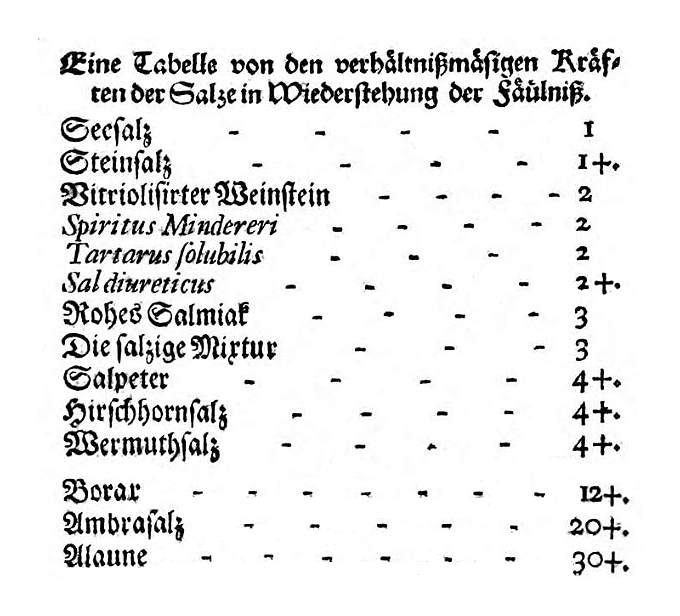 Tabelle von fäulniswidrigen Substanzen